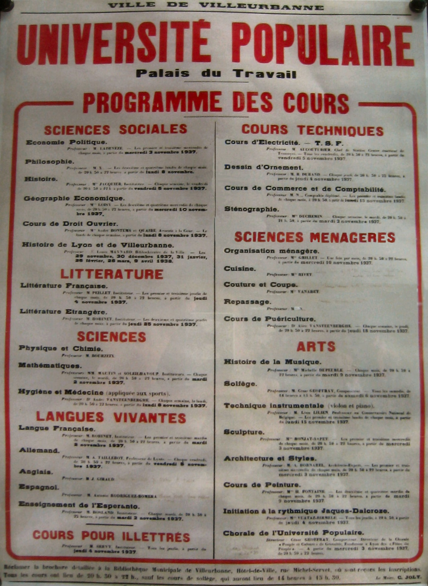 Affiche Université_populaire-Villeurbanne / programme des cours Auteur : Ghorsky